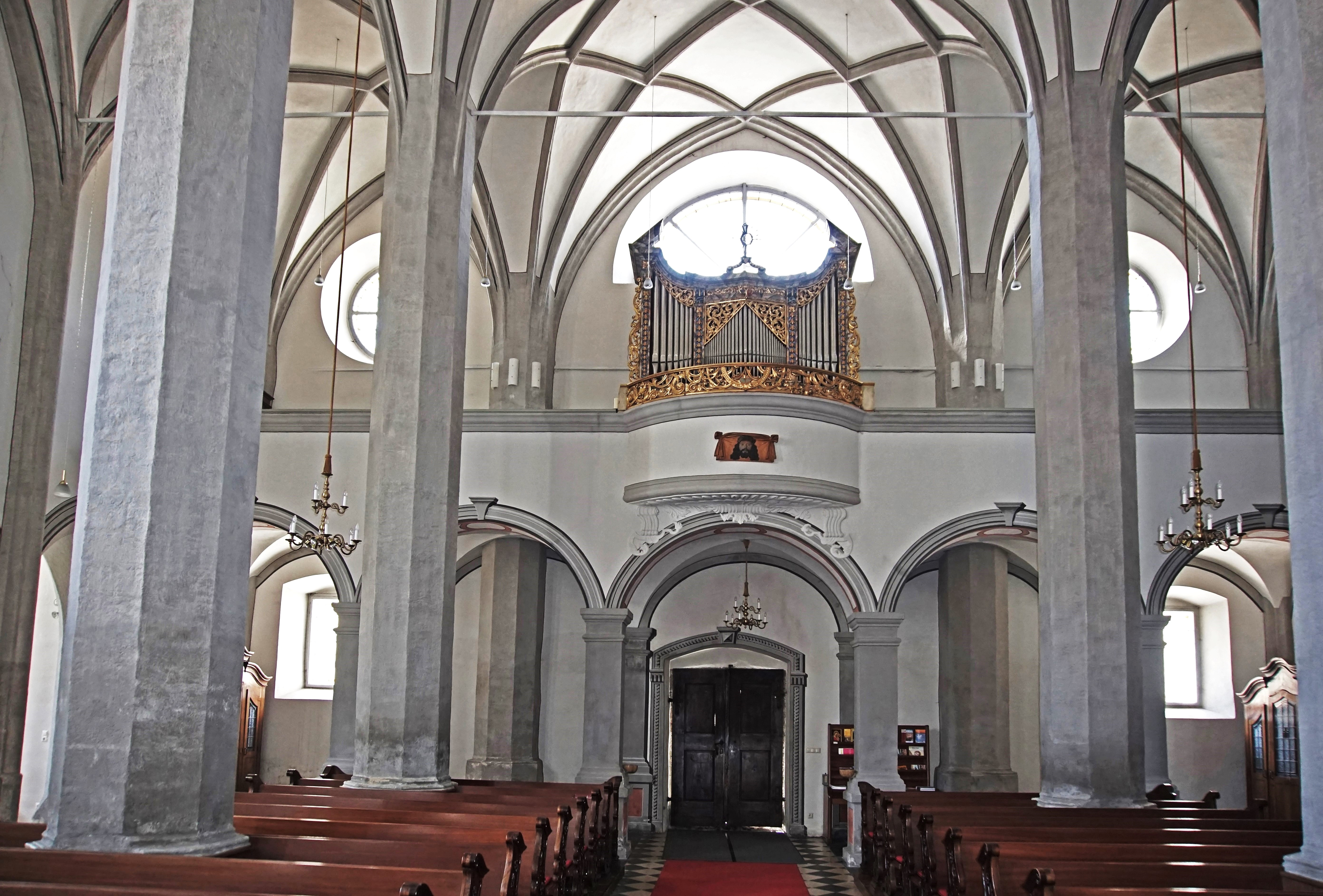 Kath. Pfarrkirche Mariä Himmelfahrt Gmünd in Kärnten, Blick gegen die Orgelampore